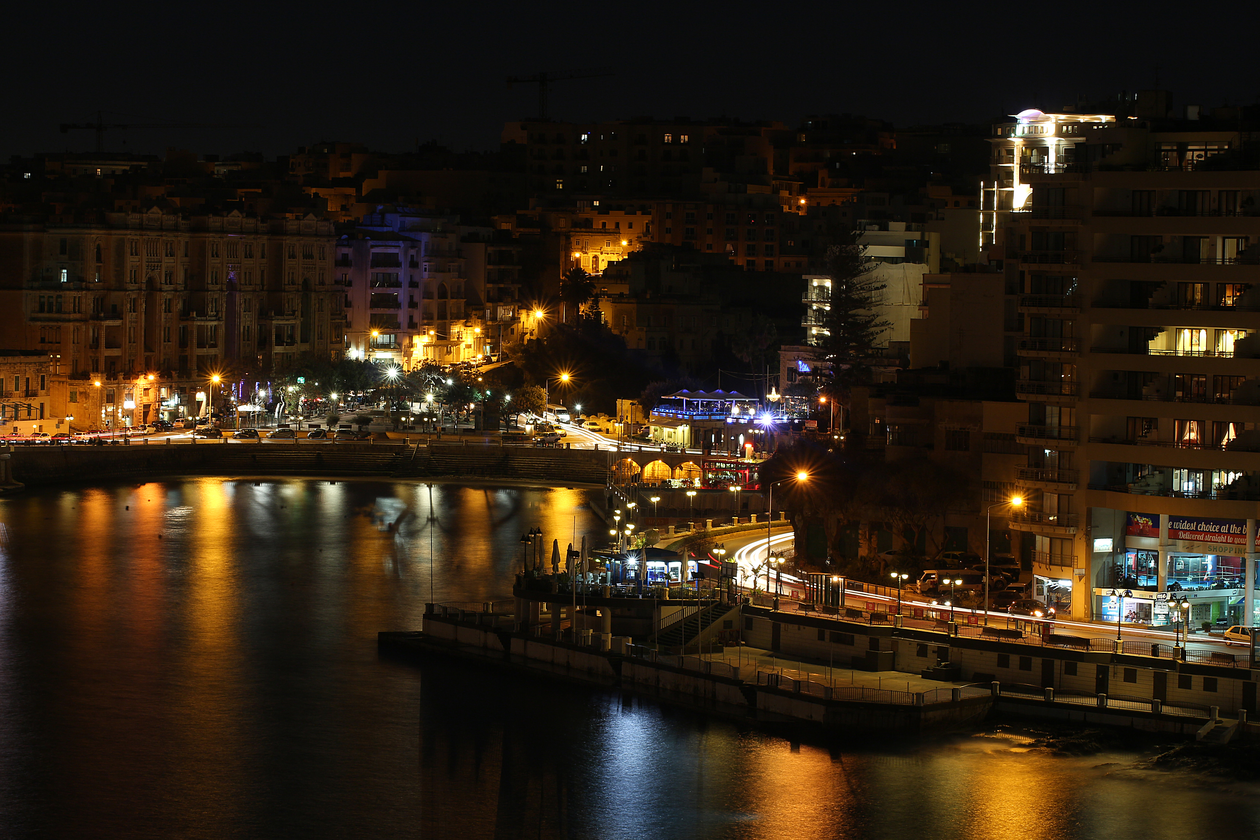 Vy över Baluta Bay i St. Julian's.